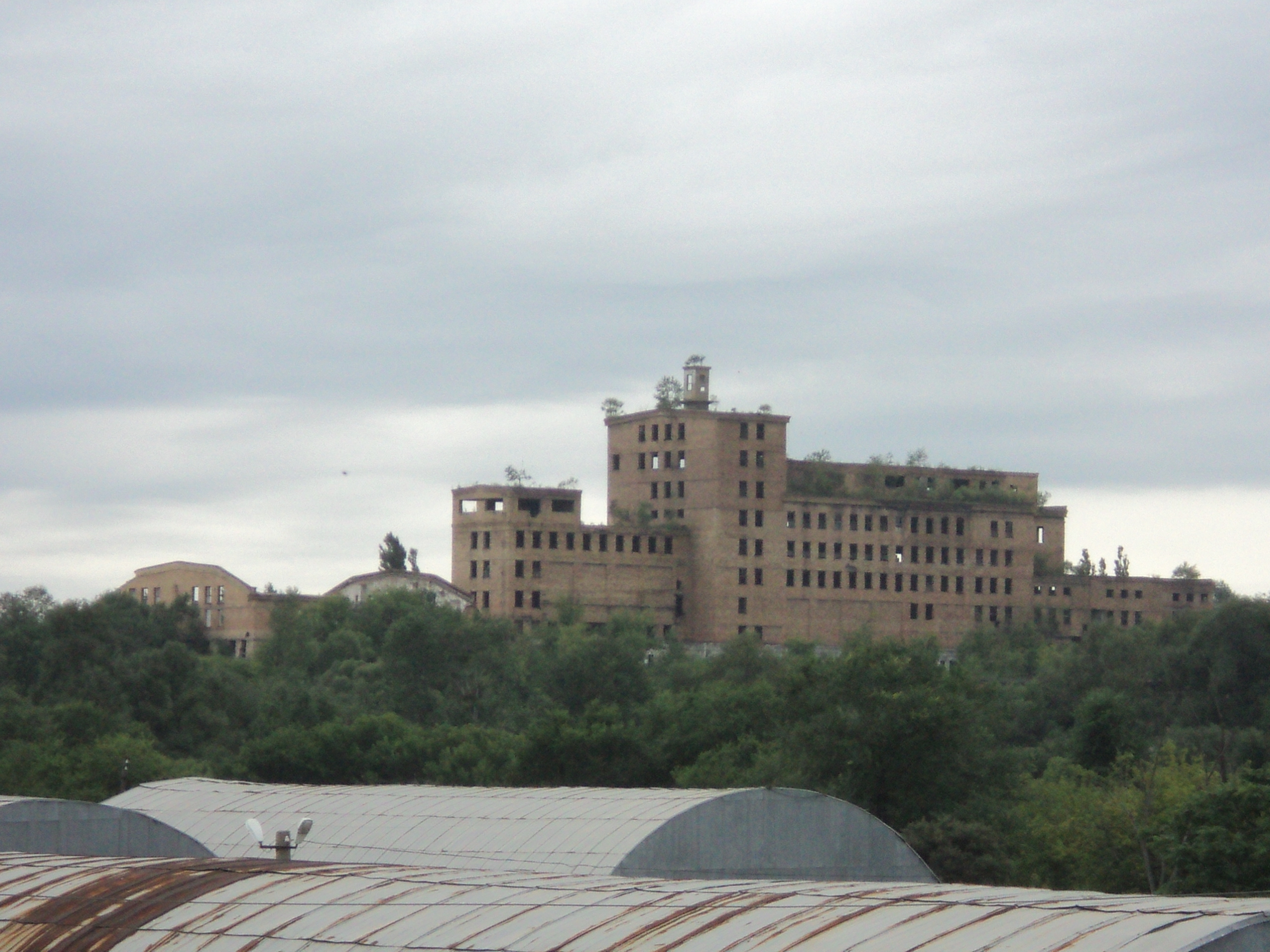 Центральная обогатительная фабрика Партизанска